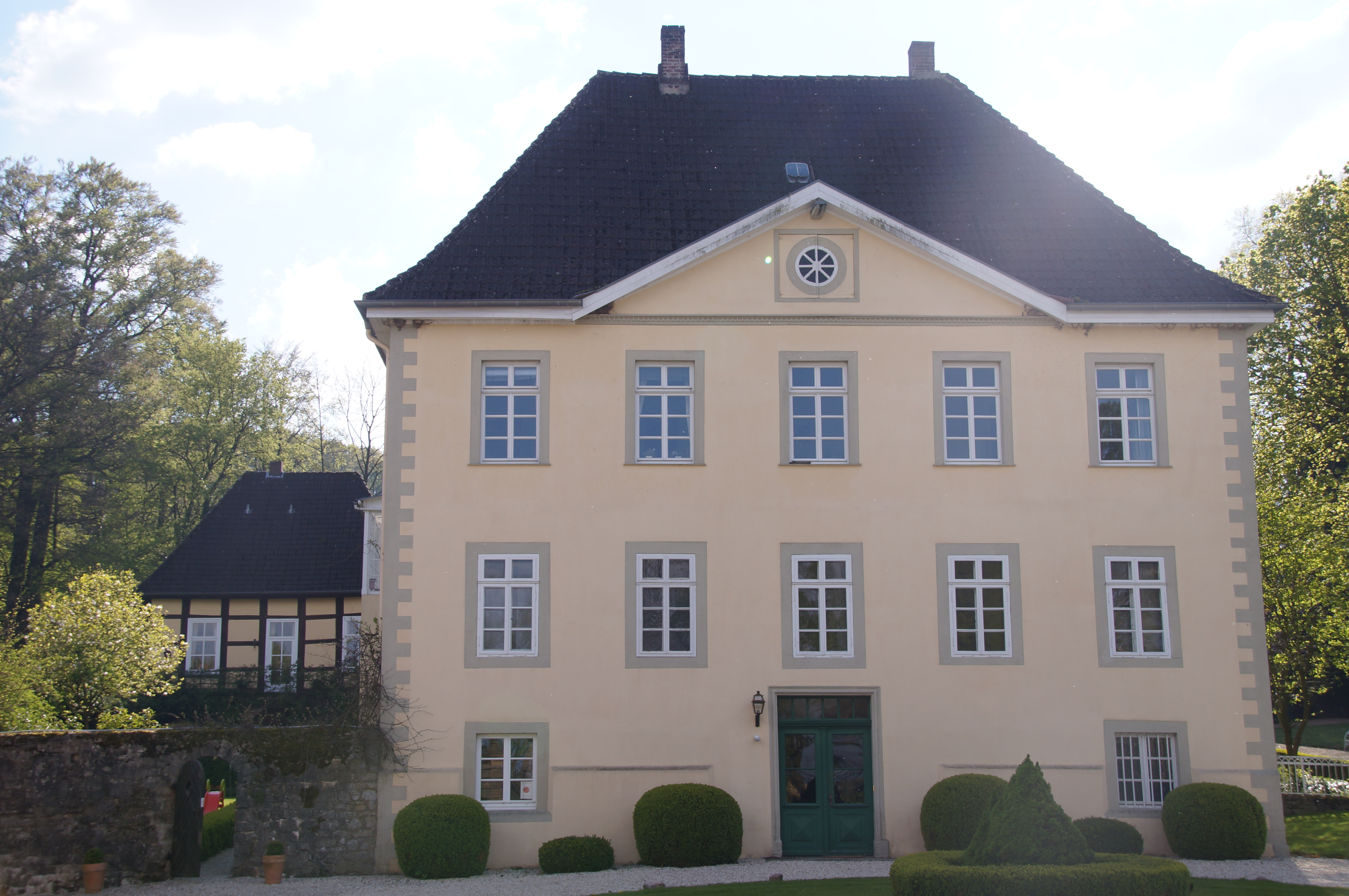 Gut Barkhausen in Leopoldshöhe, Germany This is a photograph of an architectural monument.